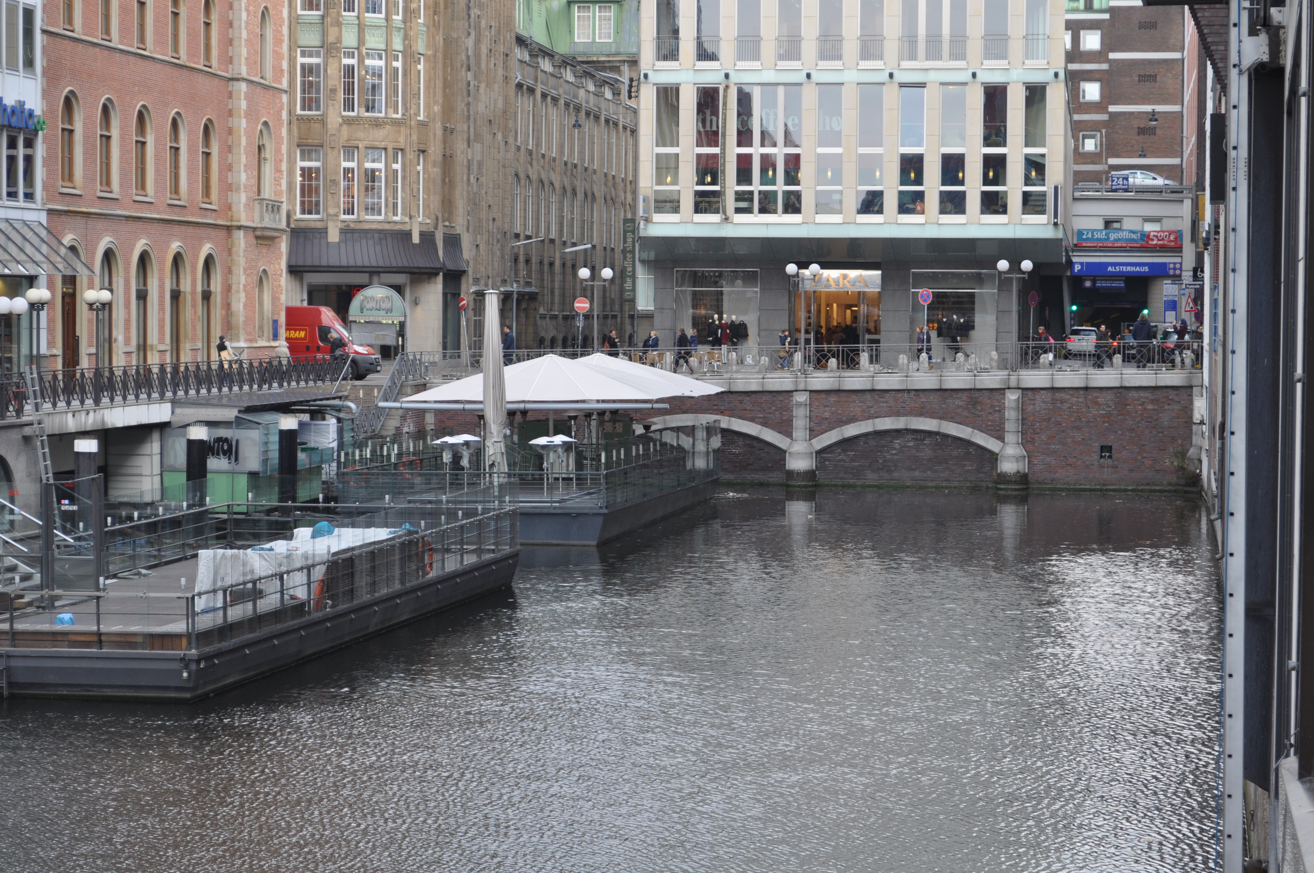 Blick vom Bleichensteg auf die Postbrücke in Hamburg-Neustadt.